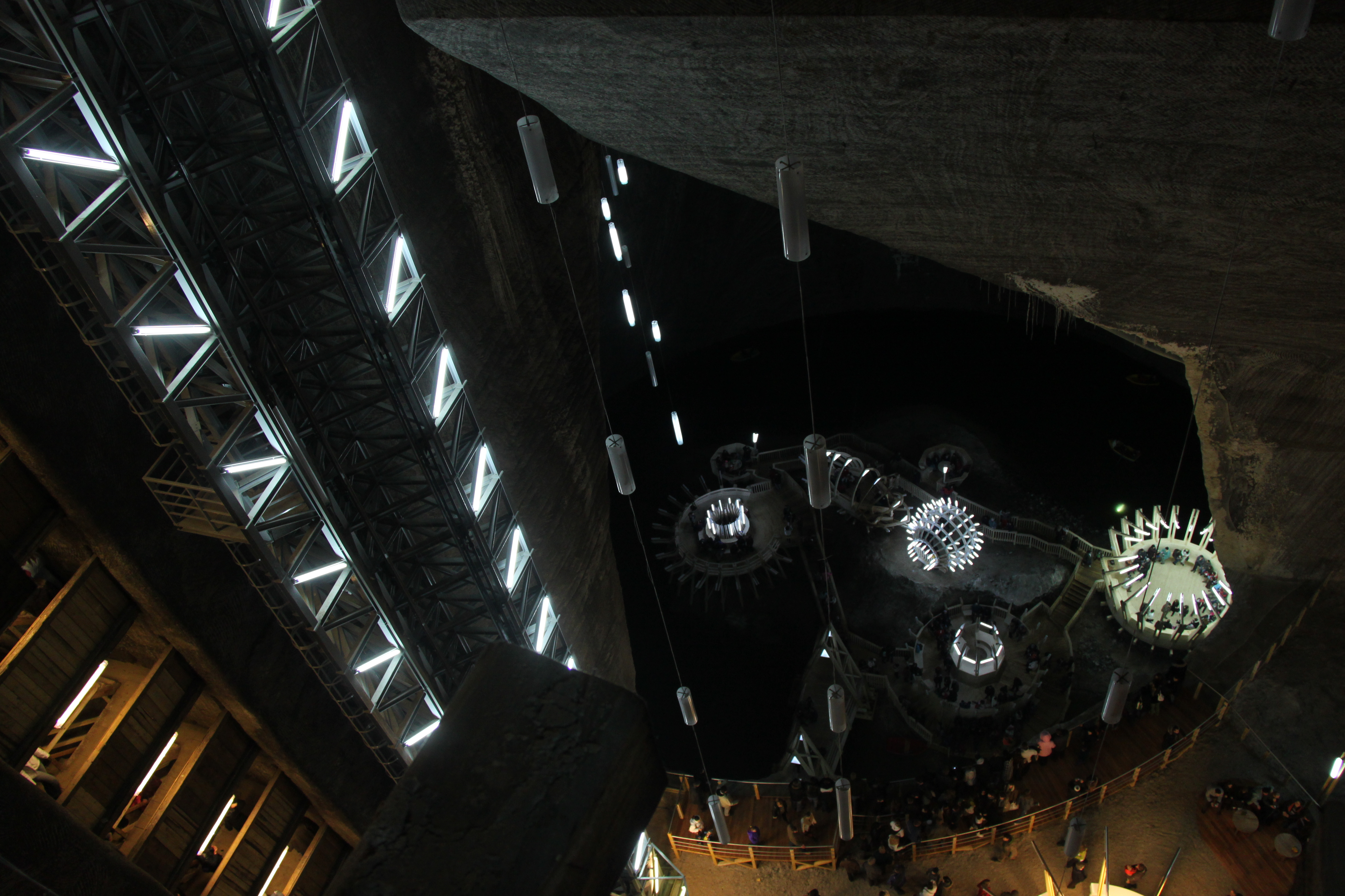 Intrepătrunderea între mina Rudolf şi mina Tereza.